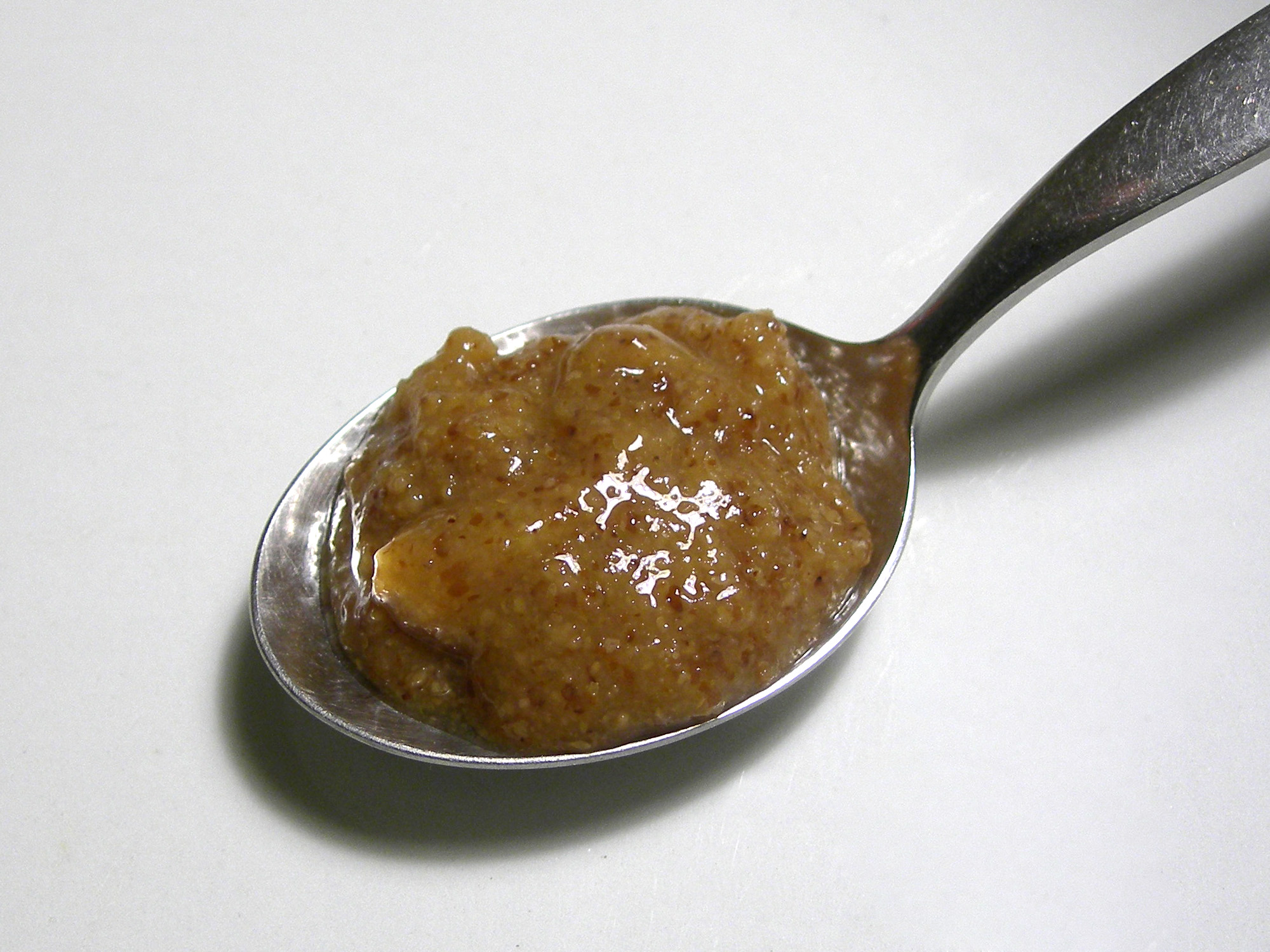 Sweet bavarian mustard